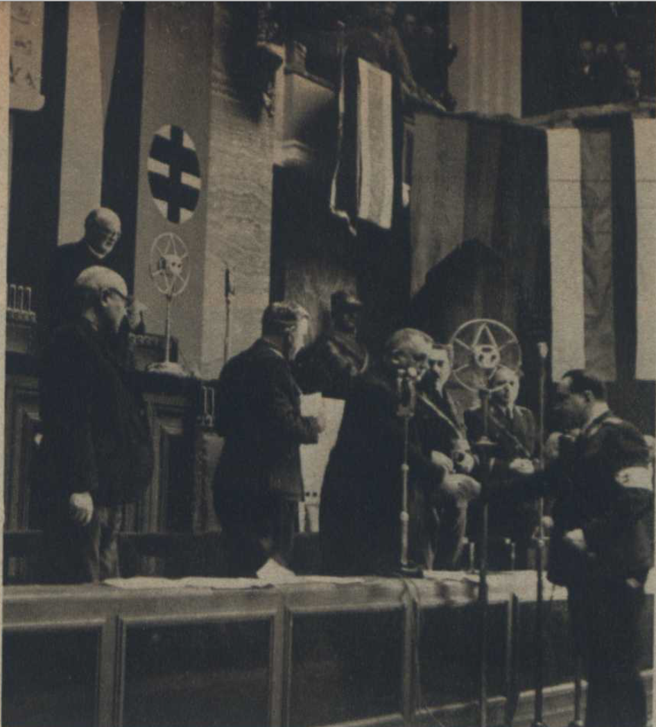 "Štátny minister Karol Sidor skladá poslanecký sľub do rúk predsedu slovenskej vlády, dr J. Tisu."